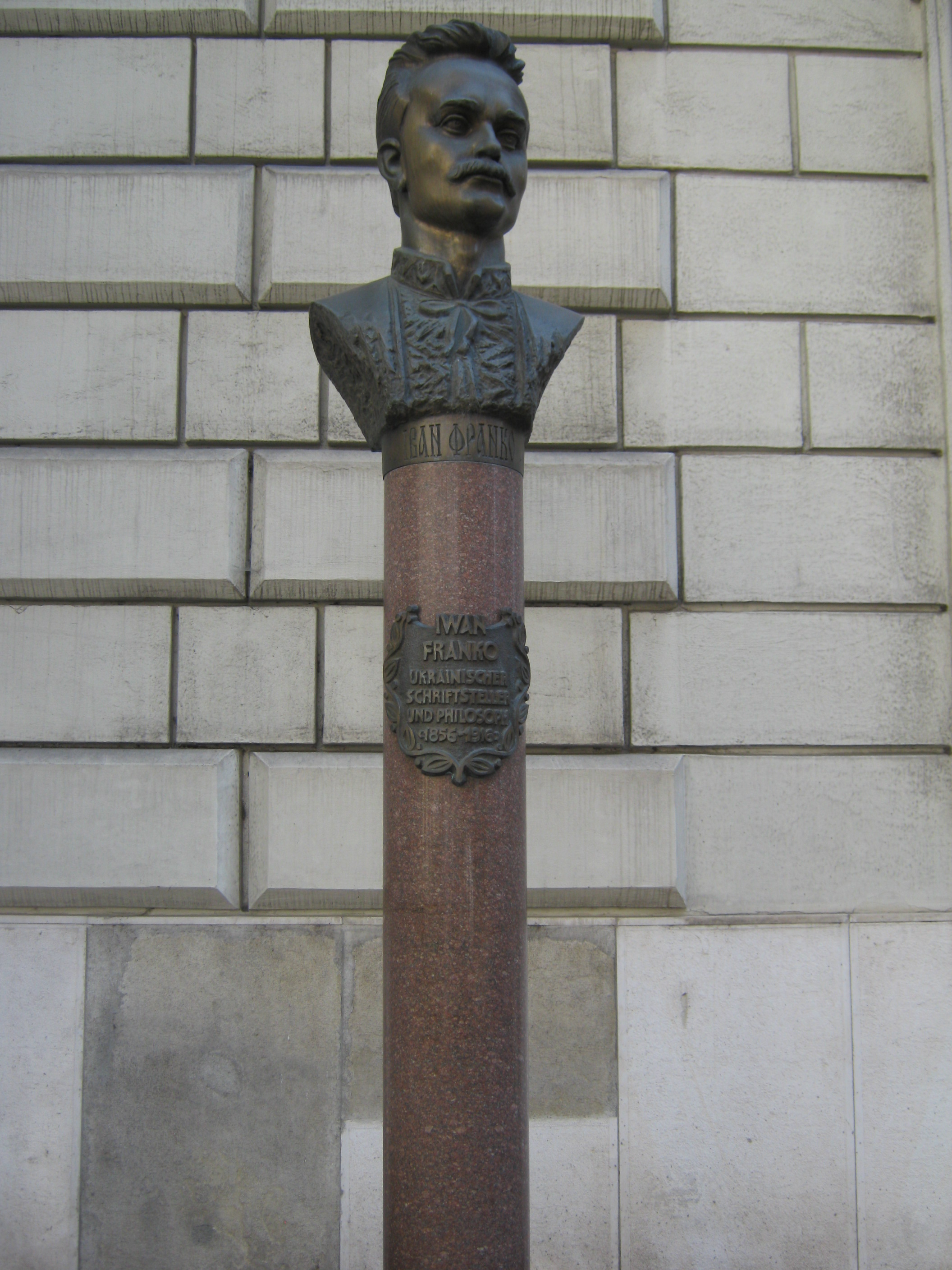 Pohruddia I.Franka u Vidni: Погруддя І.Франка у Відні (Австрія)